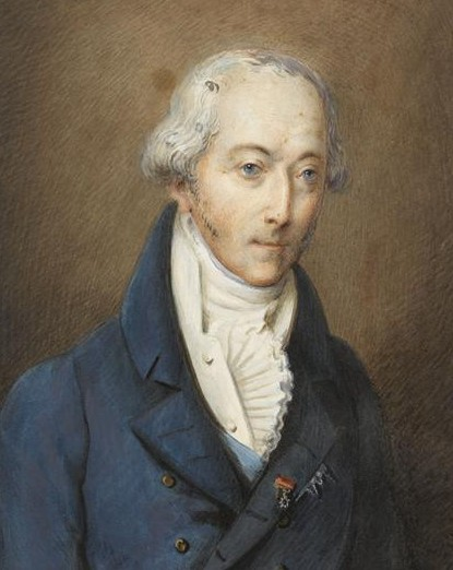 Louis Henri de Bourbon (1756-1830) Portrait par Vittore Pedretti (1799-1868) Chantilly, Musée Condé